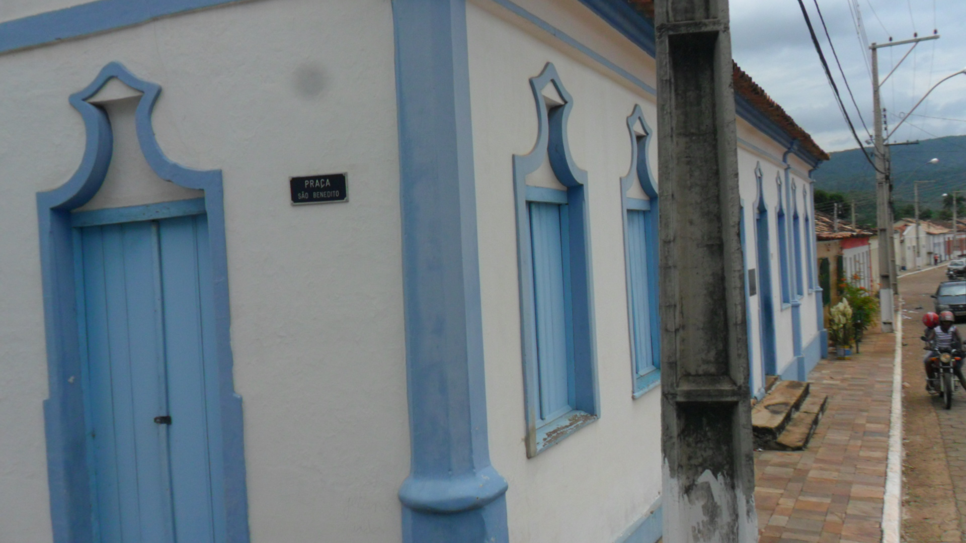 NATIVIDADE TO